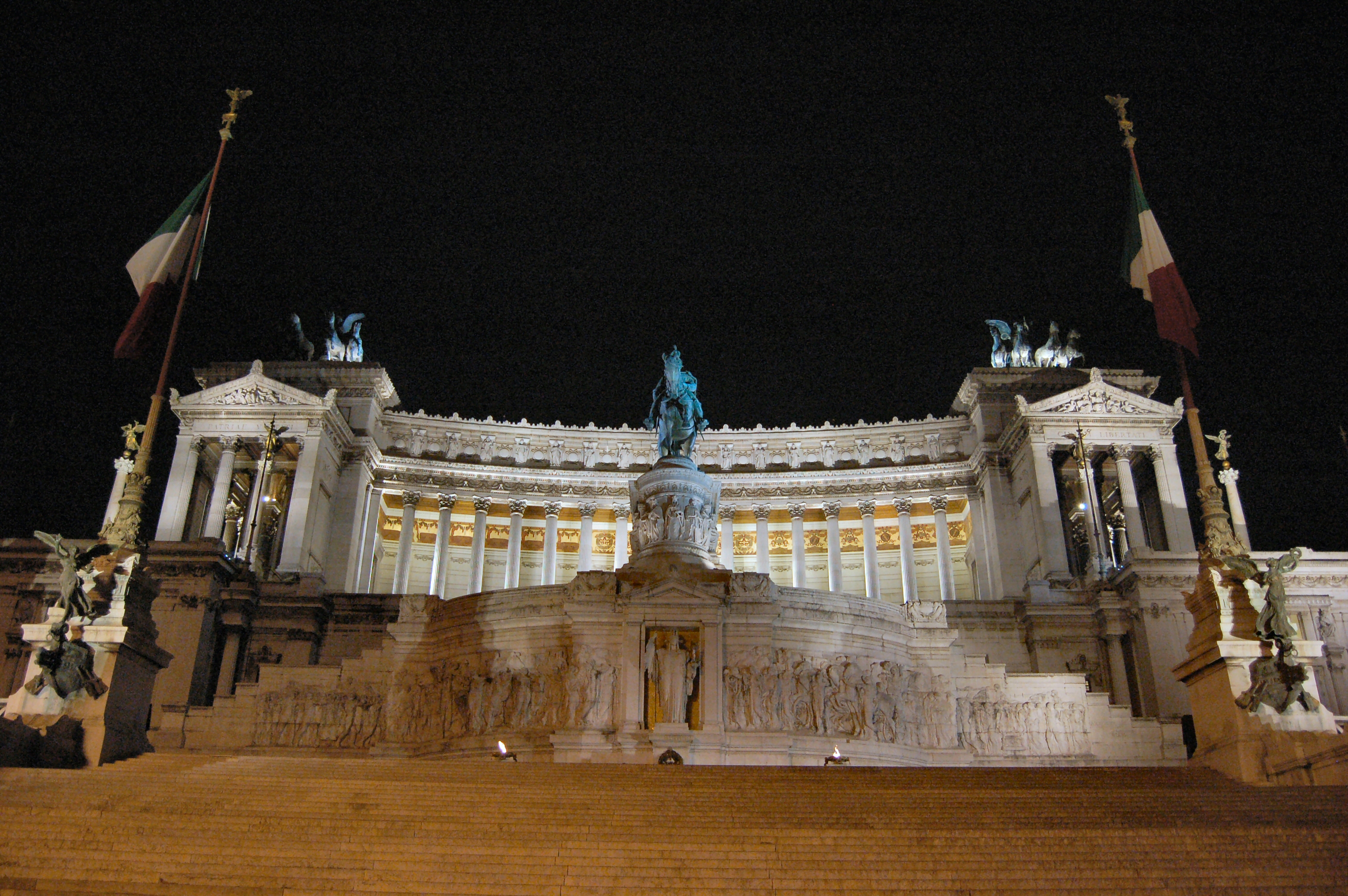 Витториано ночью.